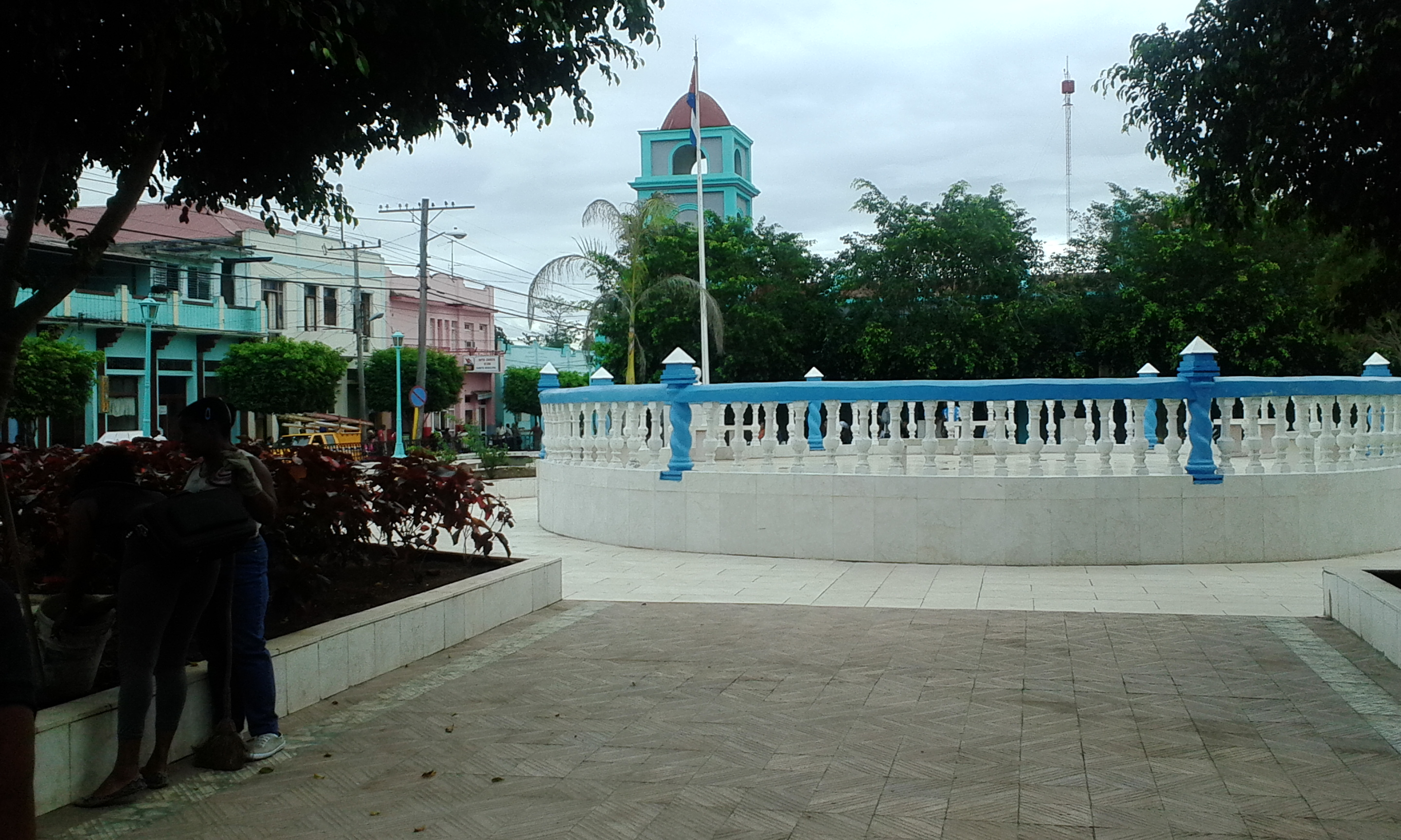 Parque José Martí